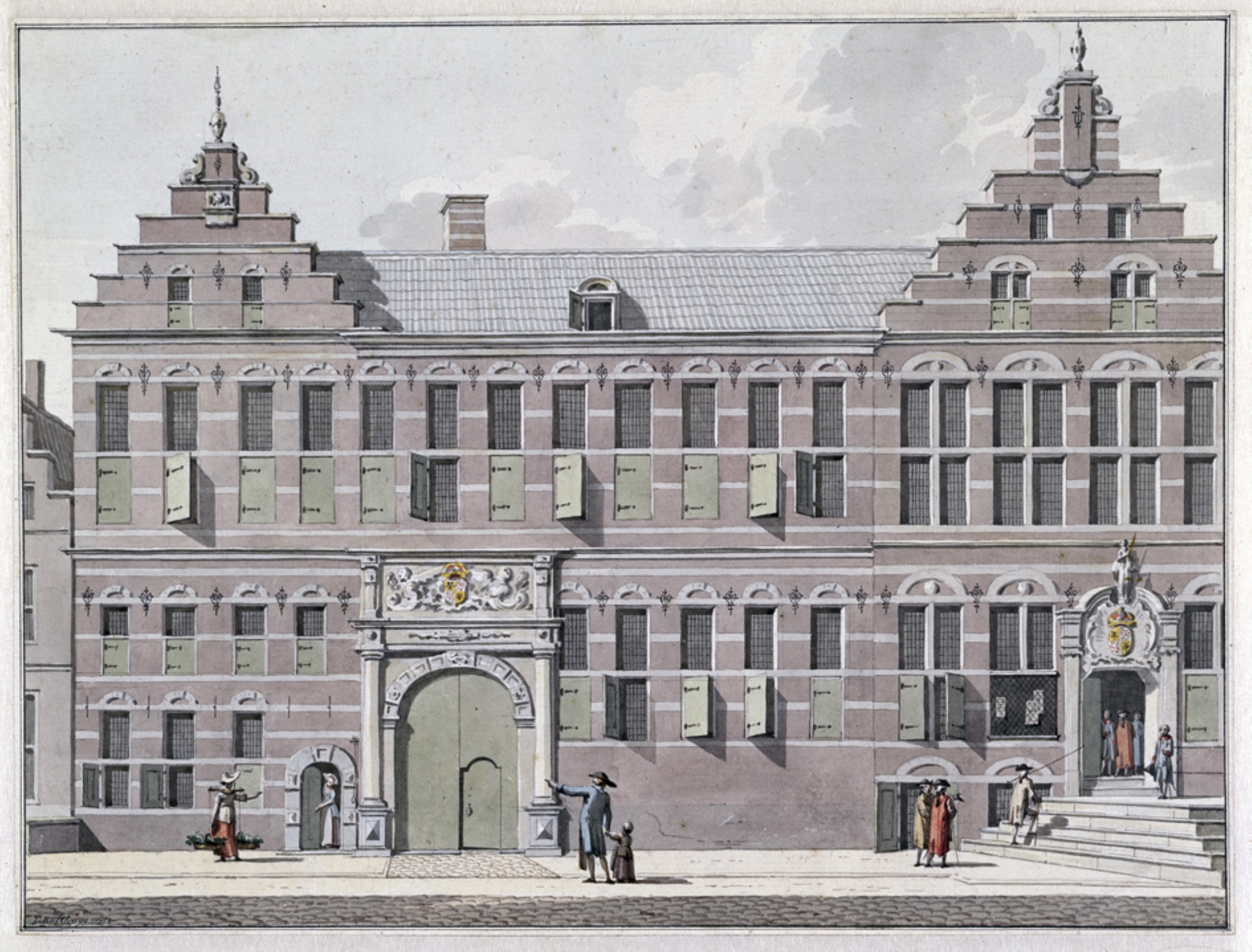 Provinciaal hof van justitie aan de Oude Boteringestraat westzijde. Later arrondissementsrechtbank